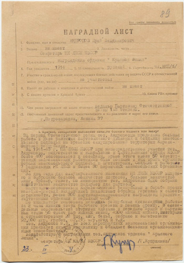 Андропов Юрий Владимирович, орден